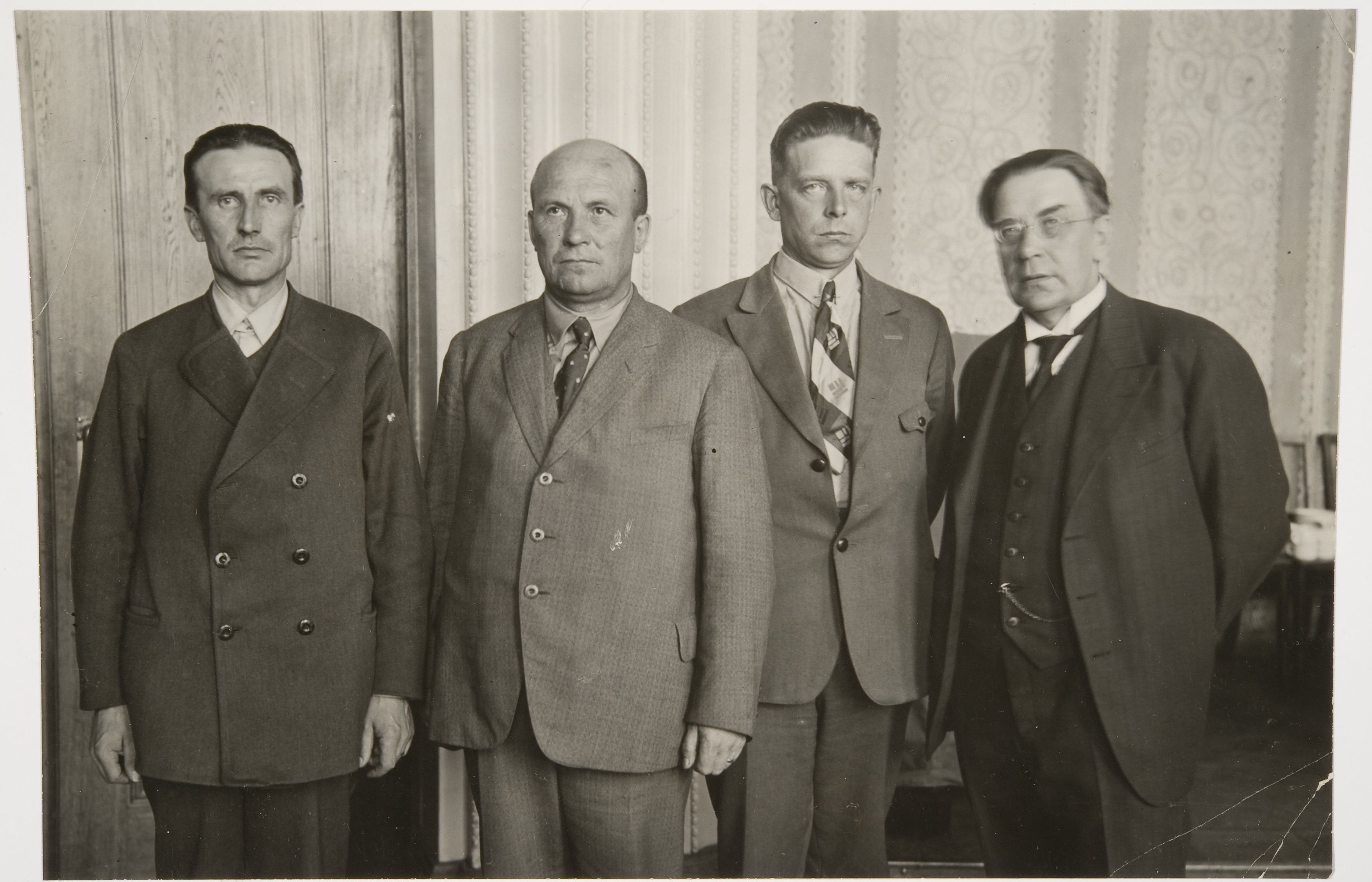 Lapuan liikkeen johtohahmot 1930. Vasemmalta Vihtori Herttua, Vihtori Kosola, Iivari Koivisto ja Kaarlo Kares.